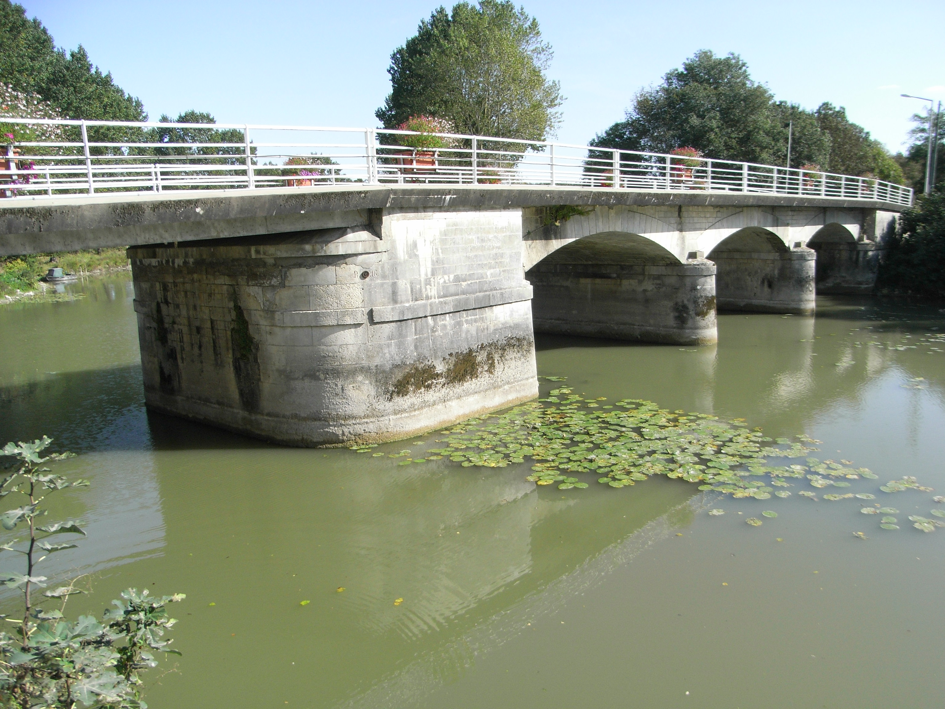 Pont (RD 739E) sur la Boutonne à Tonnay-Boutonne en Charente-Maritime (France).